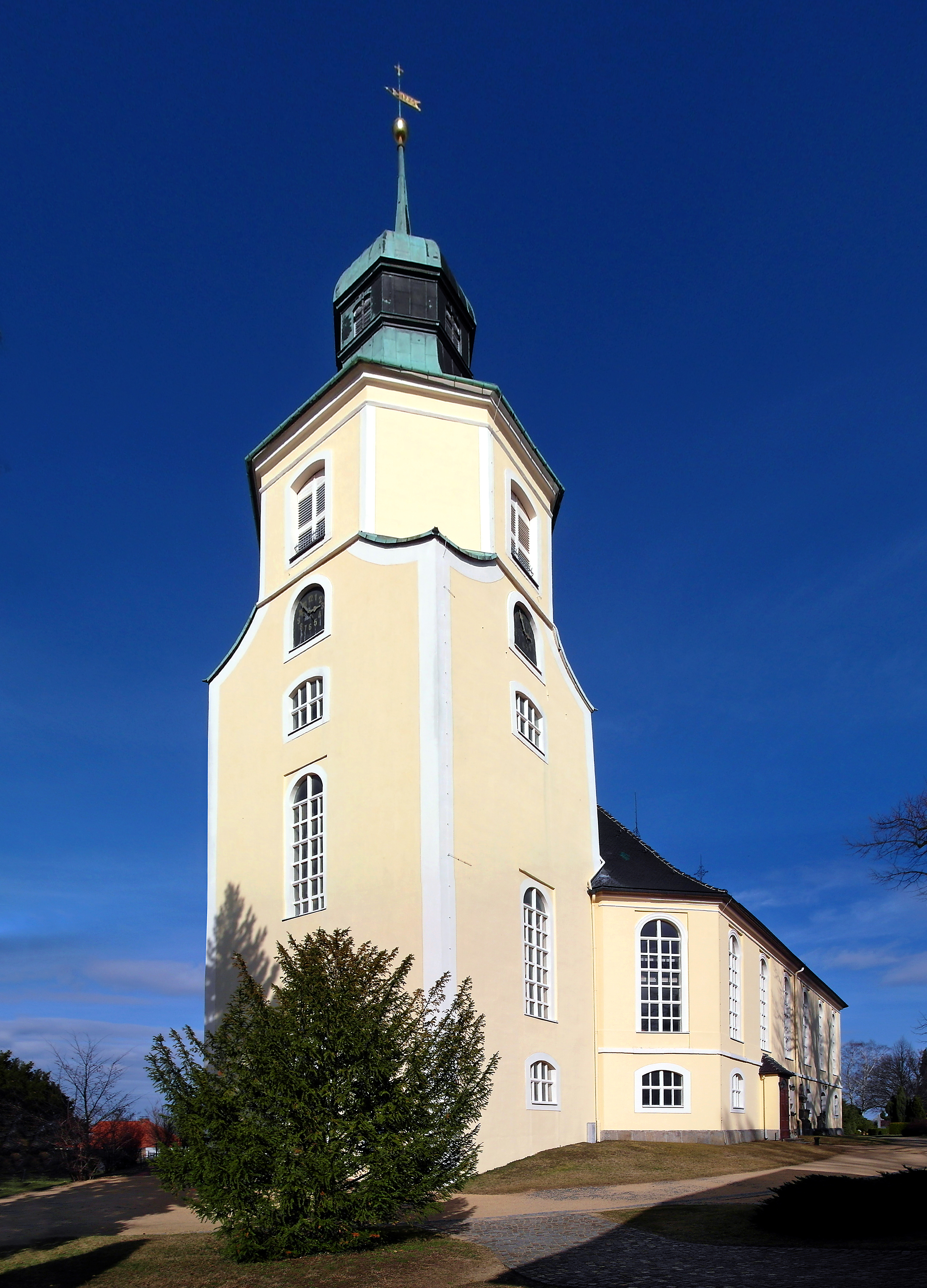 16.03.2017 02708 Kittlitz (Löbau), Alte Schulstraße: Kirche Kittlitz, heutiger Bau Mitte 18. Jh. [SAM8516-8517.JPG]20170316455MDR.JPG(c)Blobelt